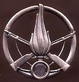 fregio da basco della Fanteria dell'Esercito Italiano.